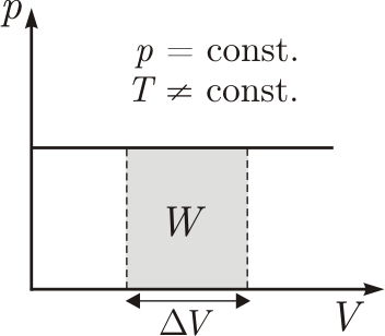 zobrazenie práce v izobarickom diagrame Licensing